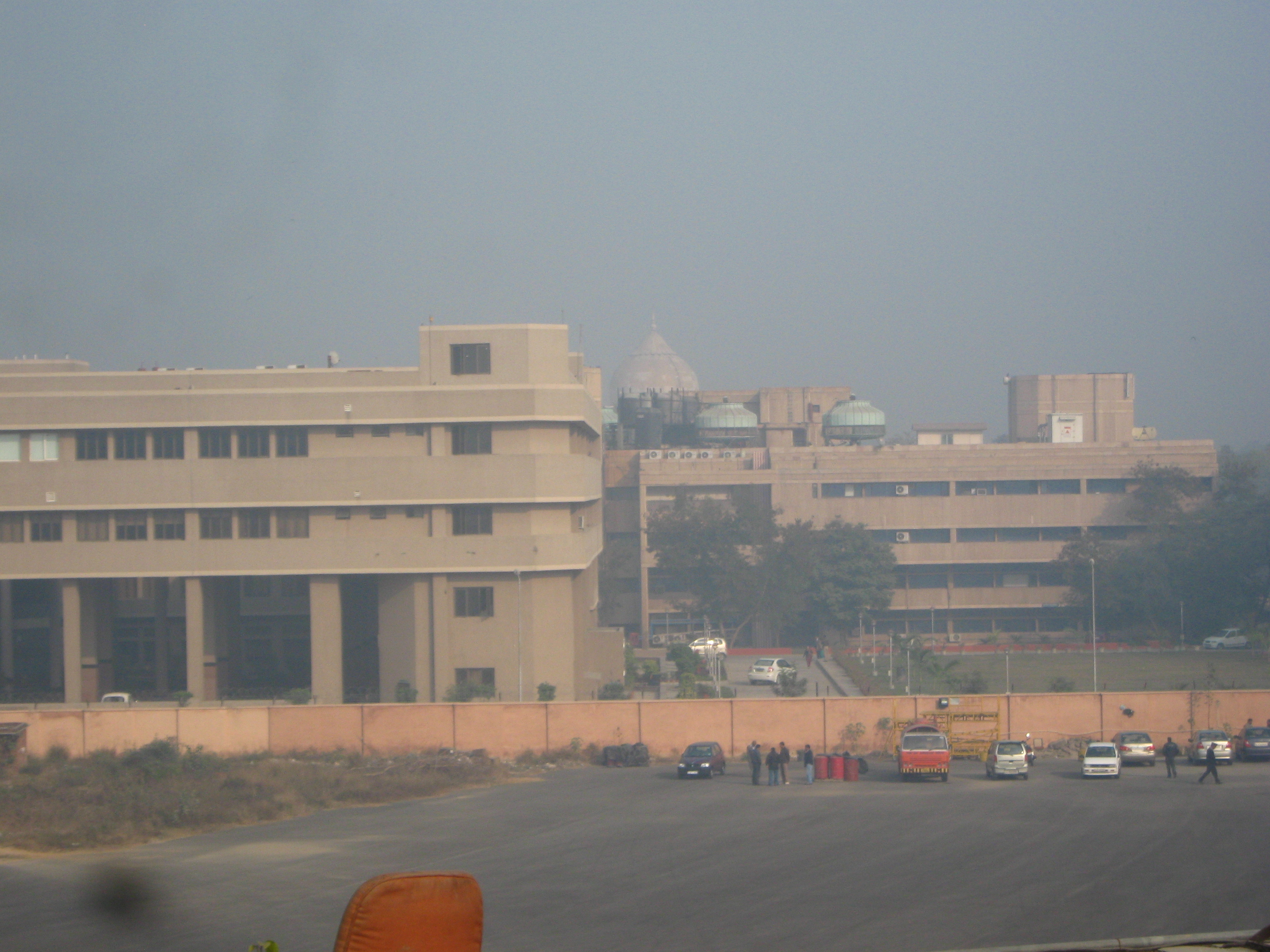 Safdarjung Airport with Safdarjung tomb in backdrop